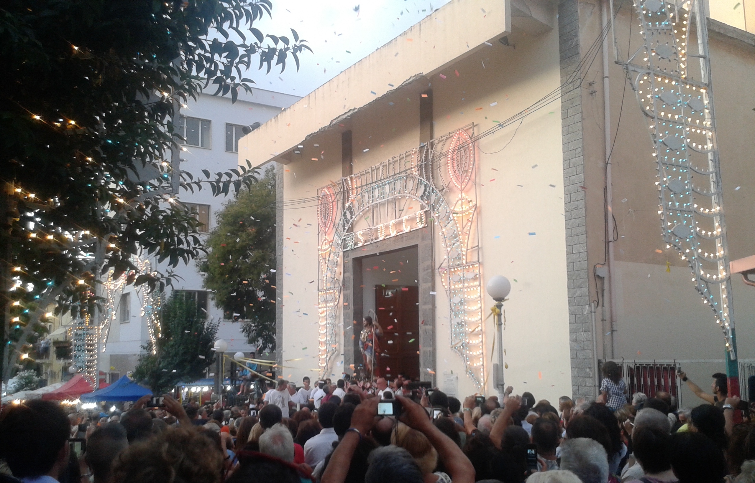 Uscita della vara di san Rocco dalla chiesa. Palmi (RC)